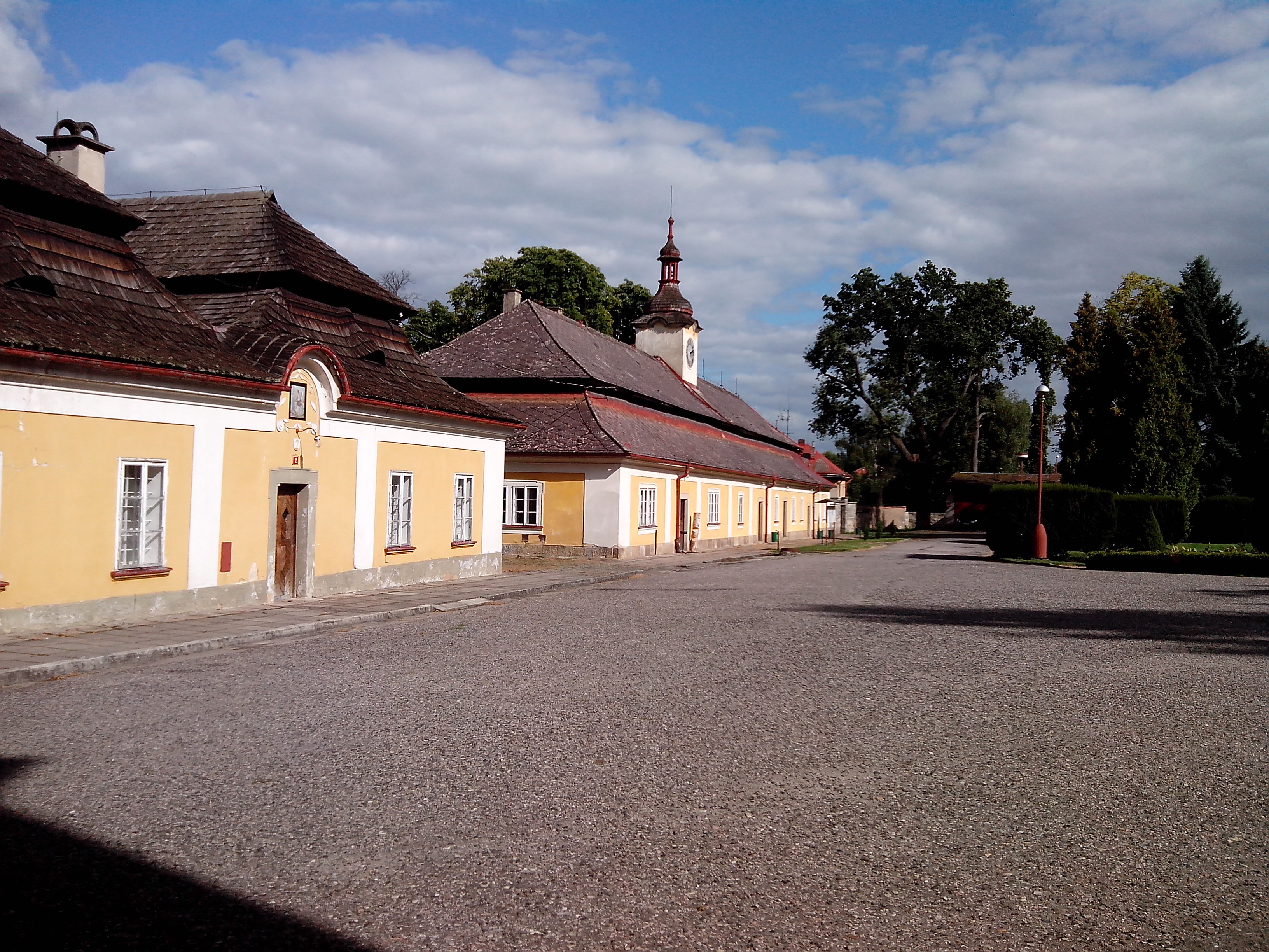 Bílé Poličany